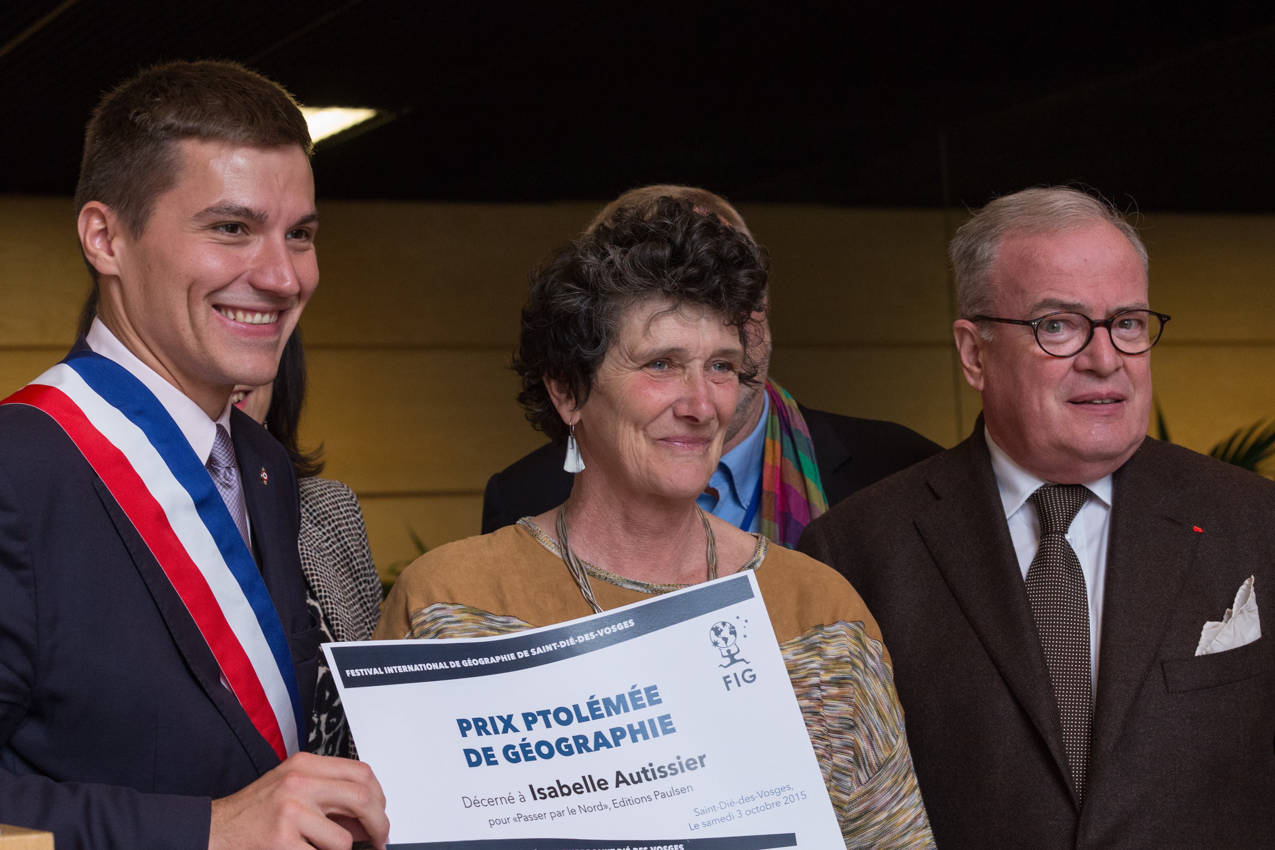 Remise du prix Ptolémée de géographie à Isabelle Autissier par David Valence, maire de Saint-Dié, et Christian Pierret.